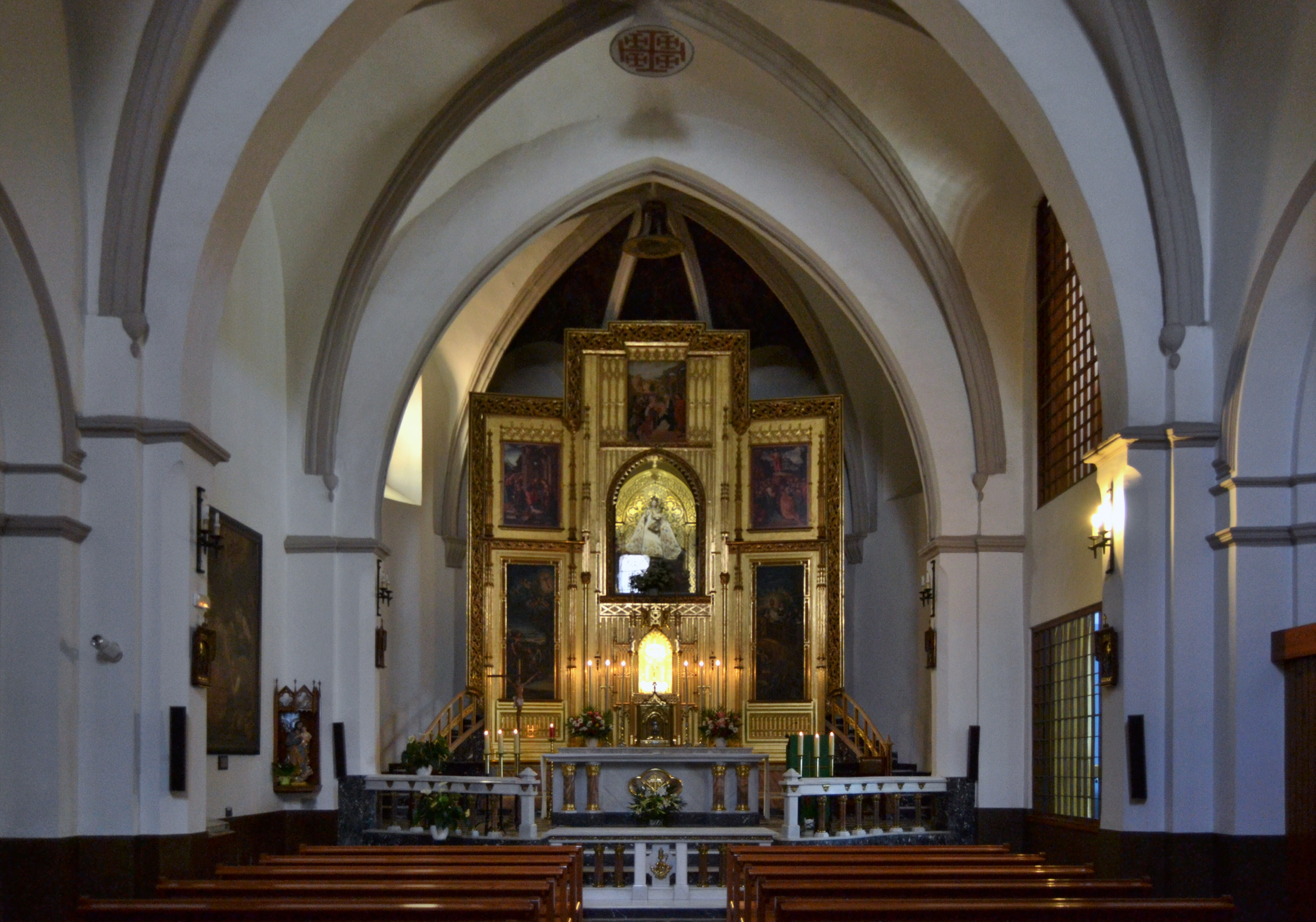 Interior de l'església del convent de santa Clara - Gandia. 25.131-022.